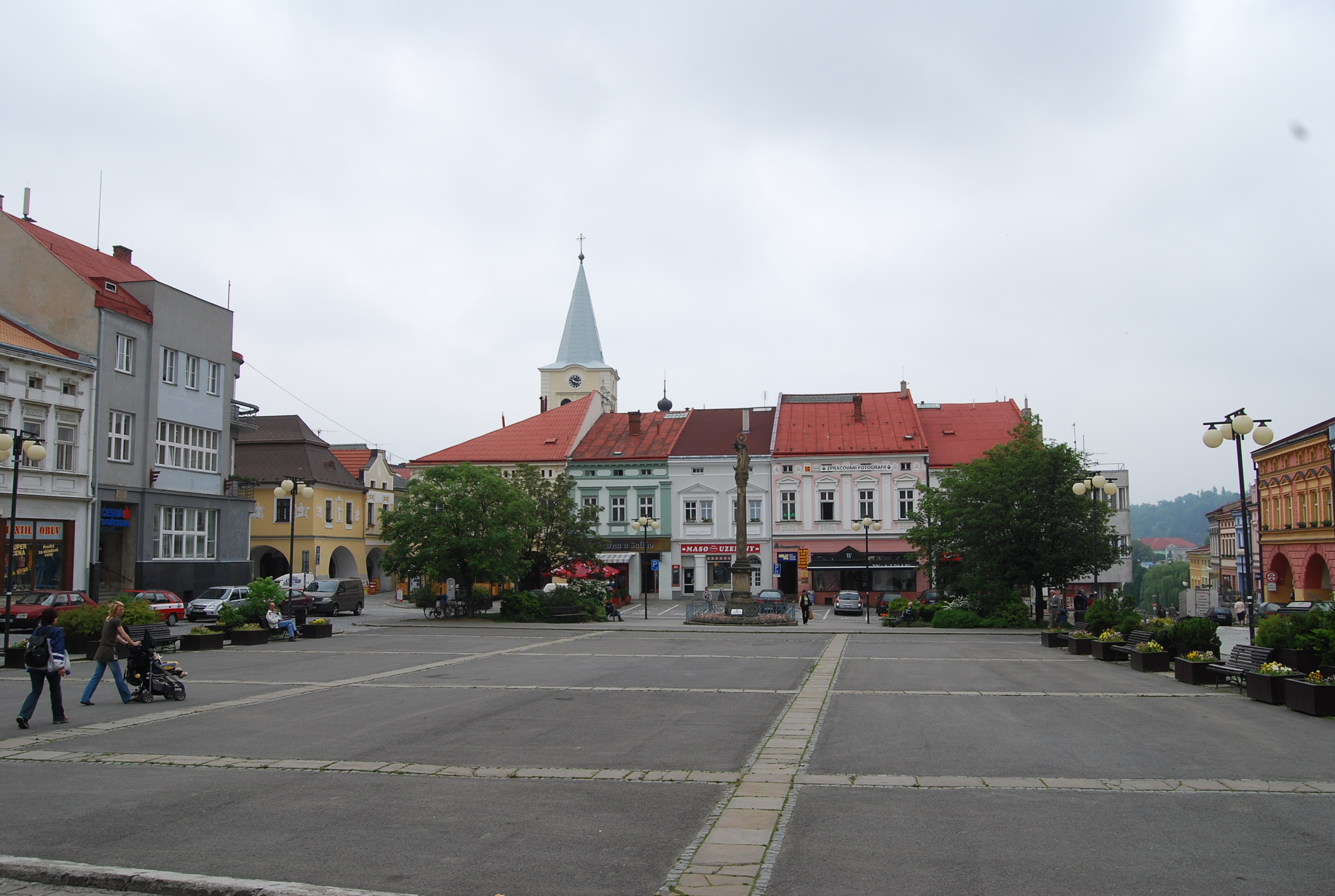 Náměstí ve Valašském Meziříčí Misto narozeni,, geboorte plaats (rok / jaar 1943 )